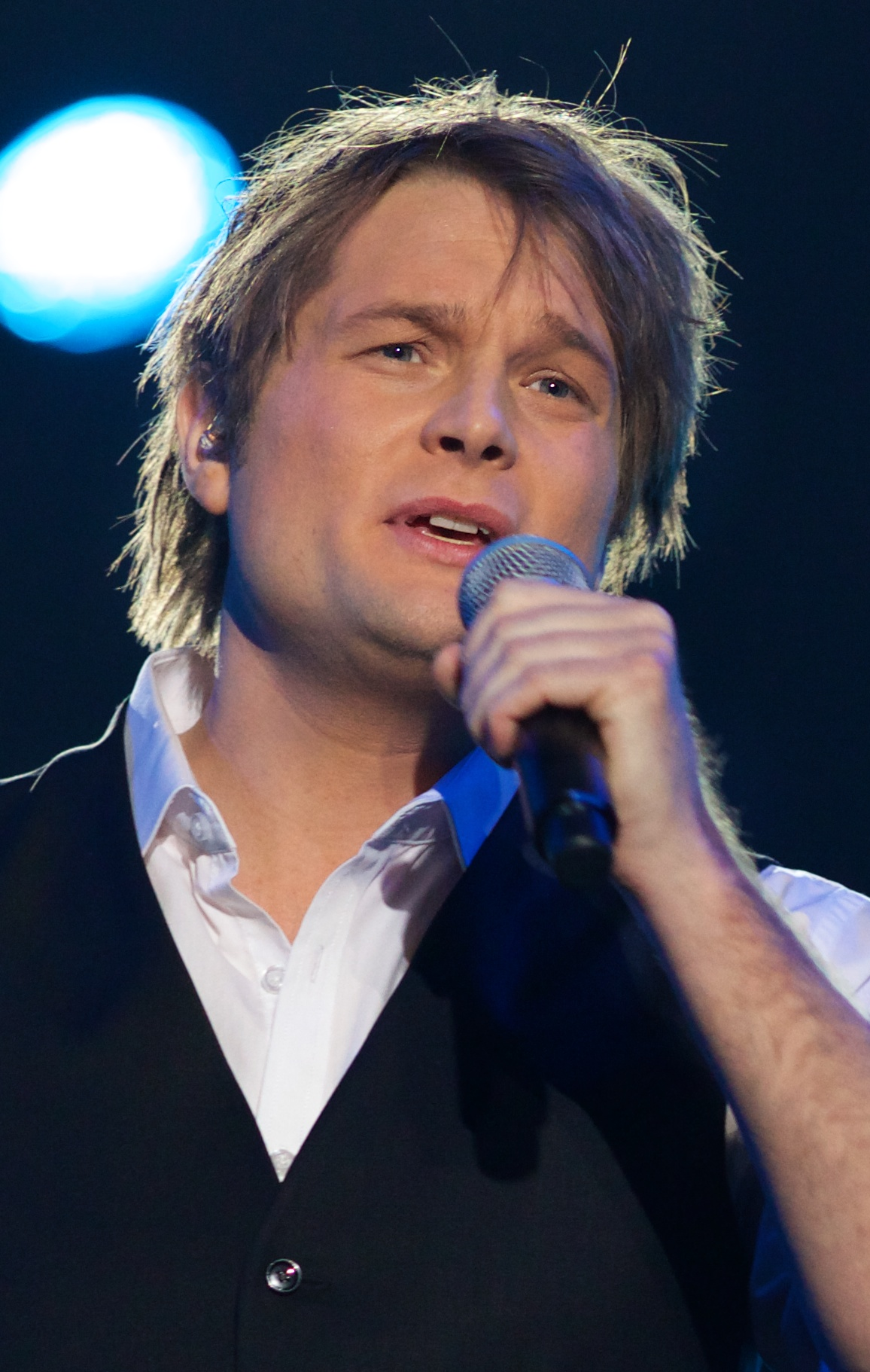 Melodi Grand Prix 2013 delfinale i Larvik